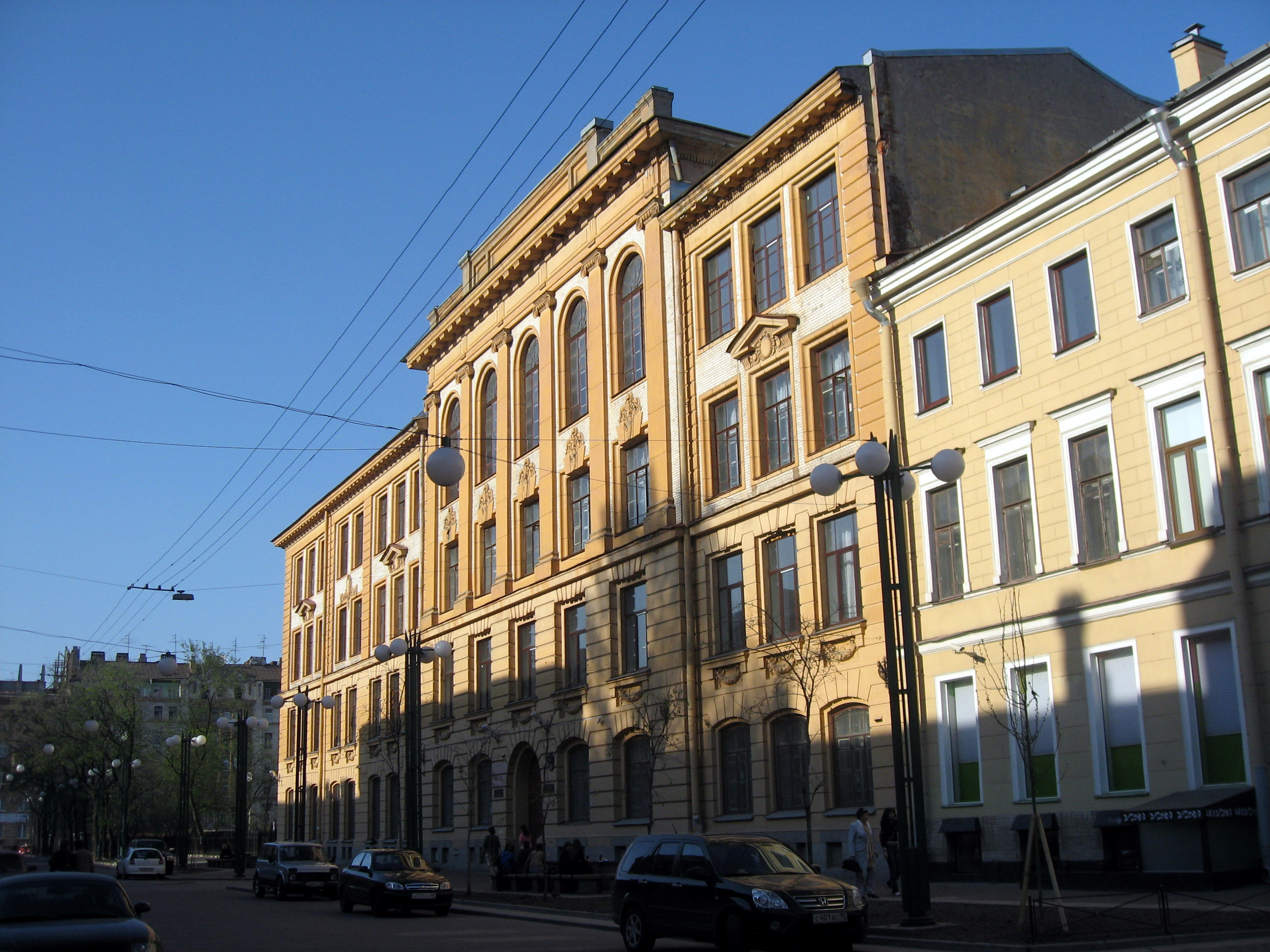 Sankt-Petěrburg